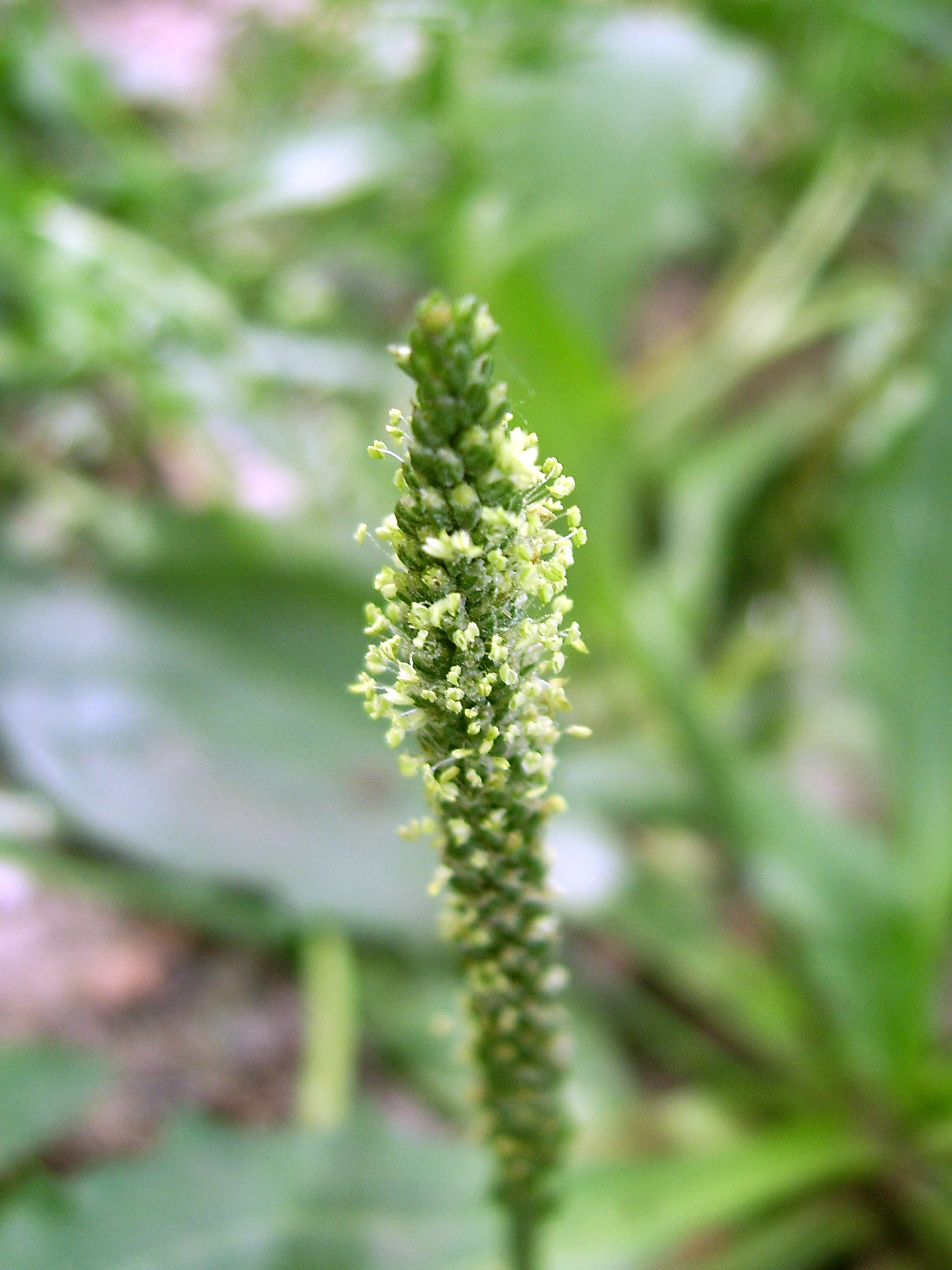 Plantago asiatica 车前草的花